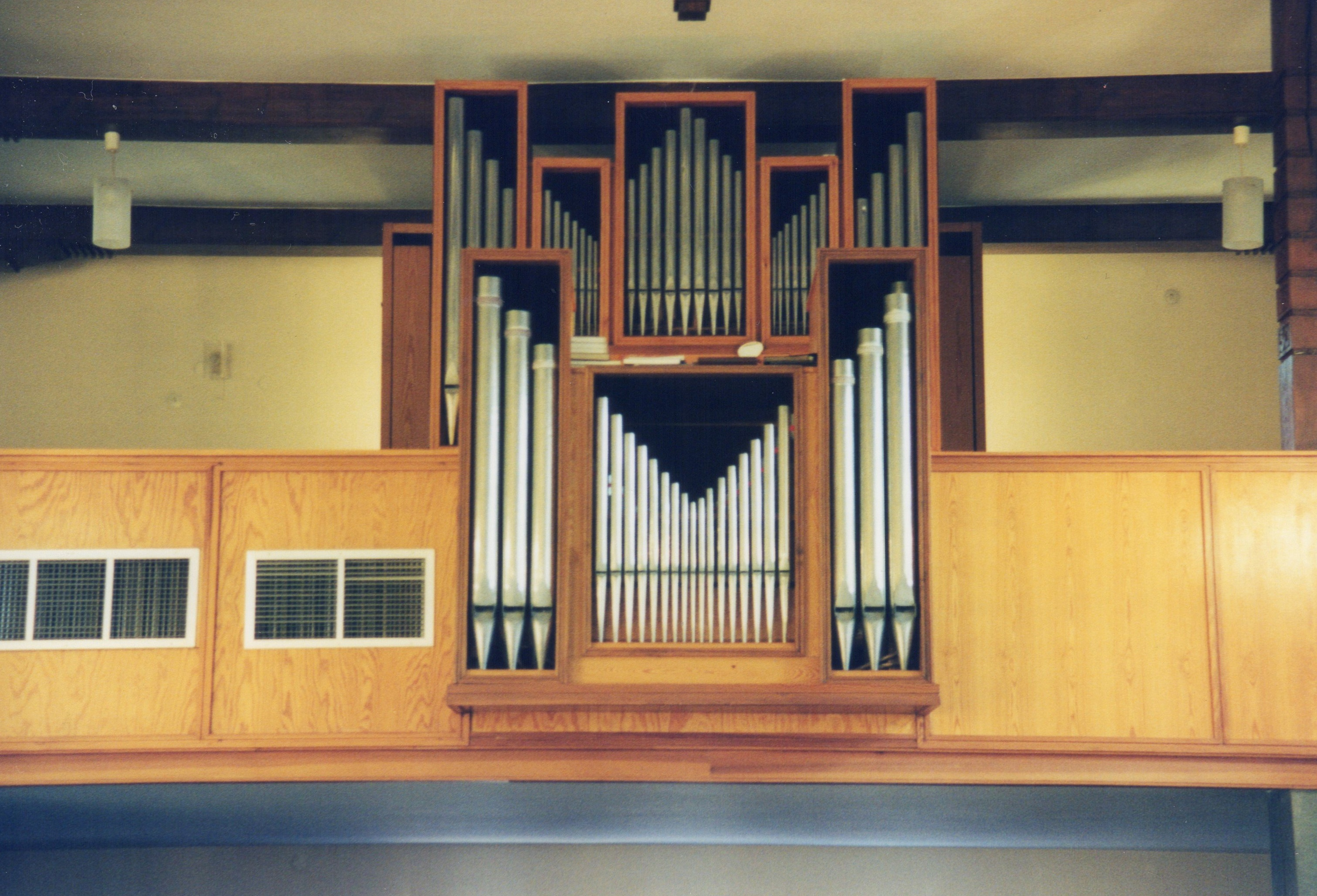 Böttner-Orgel der Zionskirche (SELK) zu Allendorf/Lumda